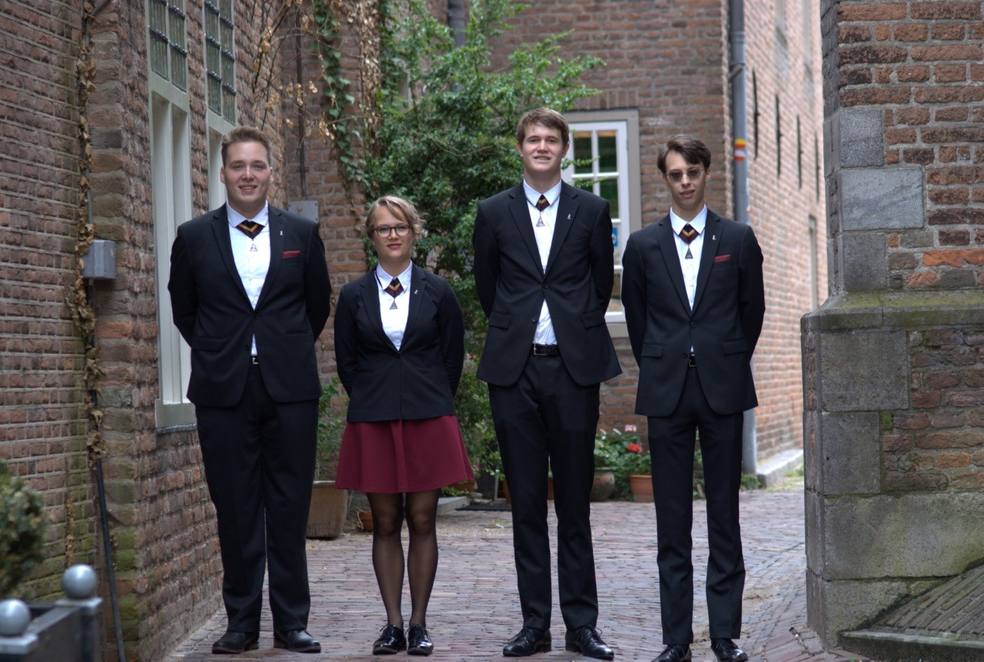 Het negenentachtigste bestuur van het Sodalicium Classicum Noviomagense